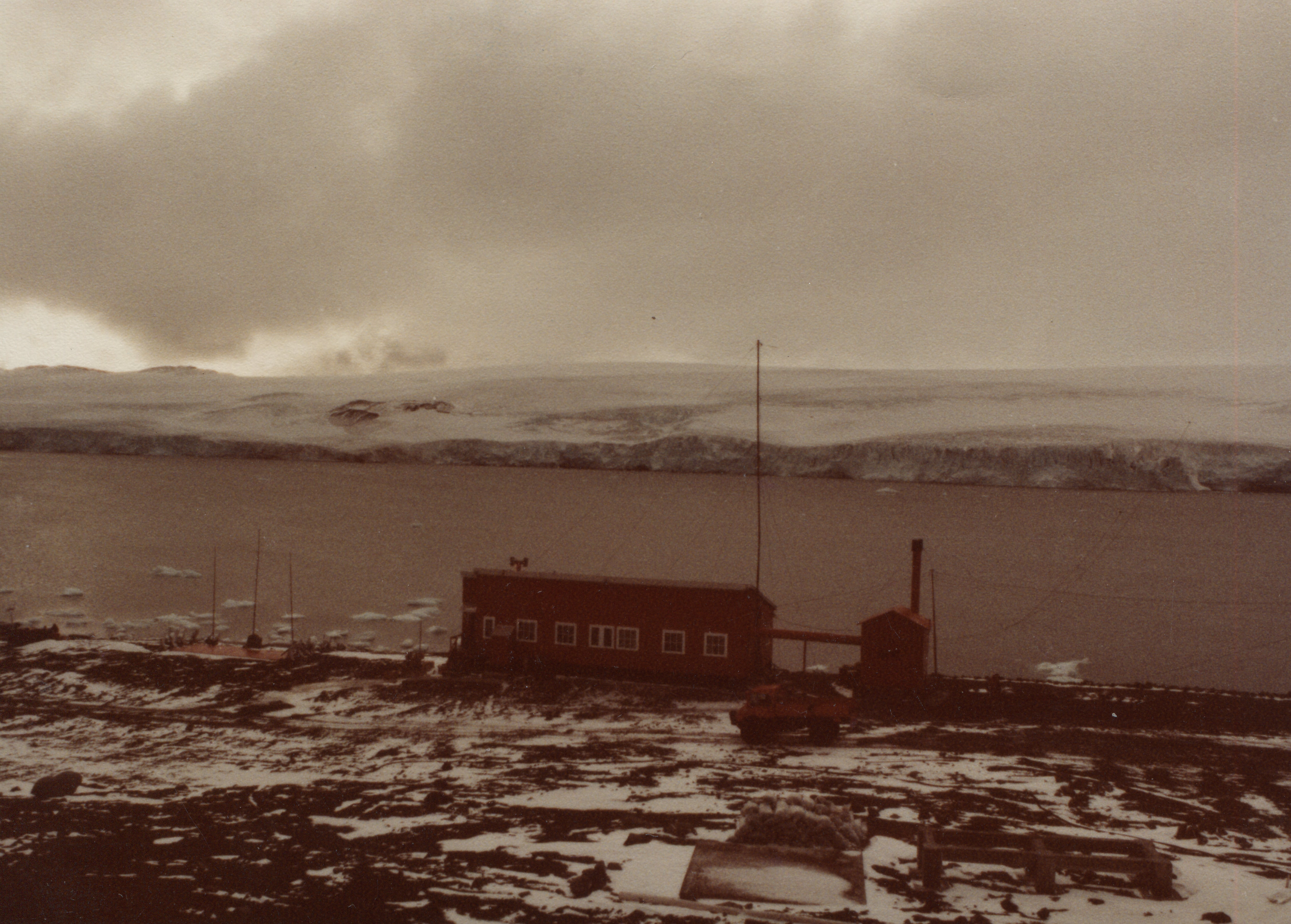 Base Carlini, en ese momento Jubany, en 1985.